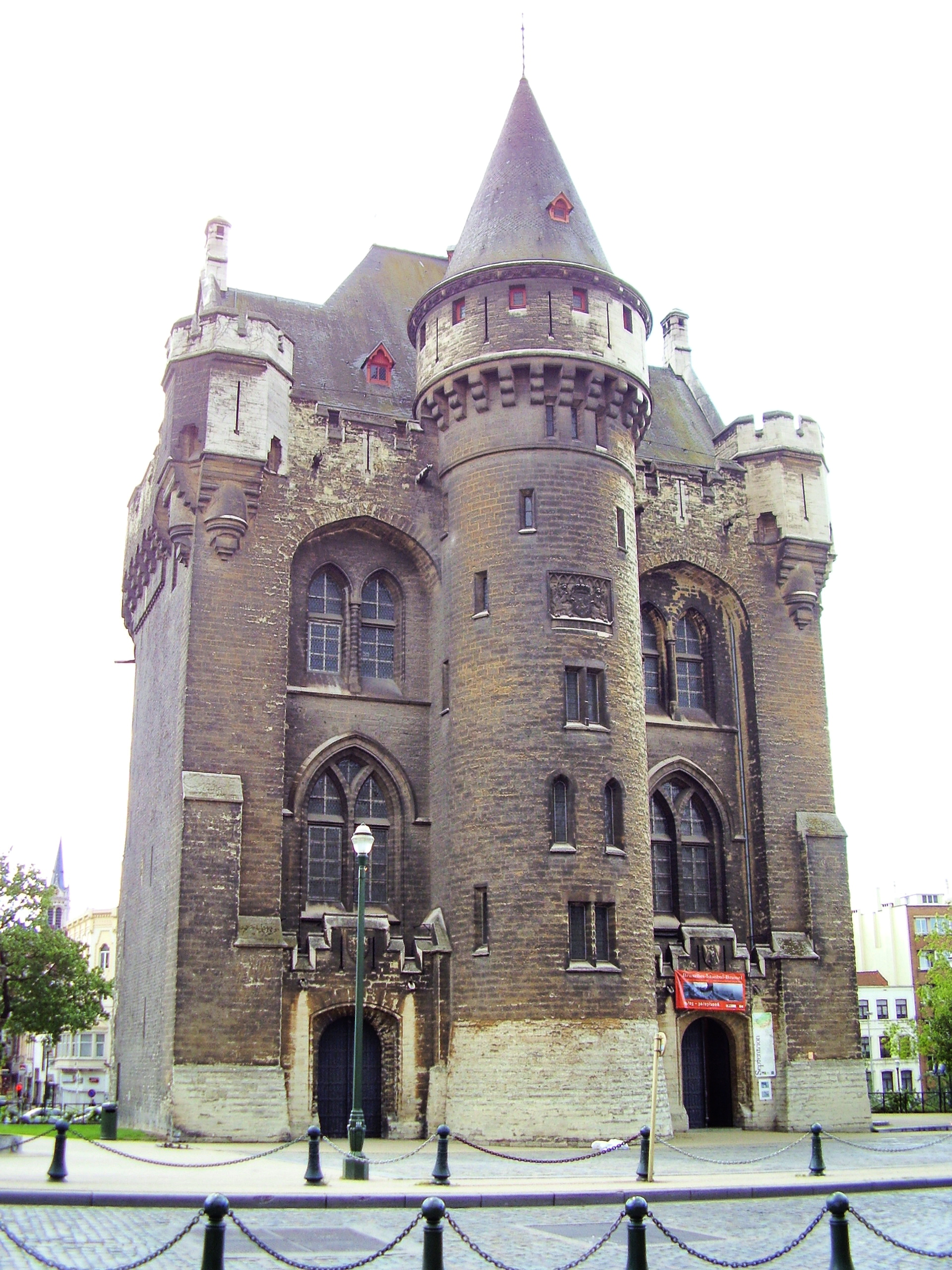 Porte de Hal – Côté Bruxelle-ville